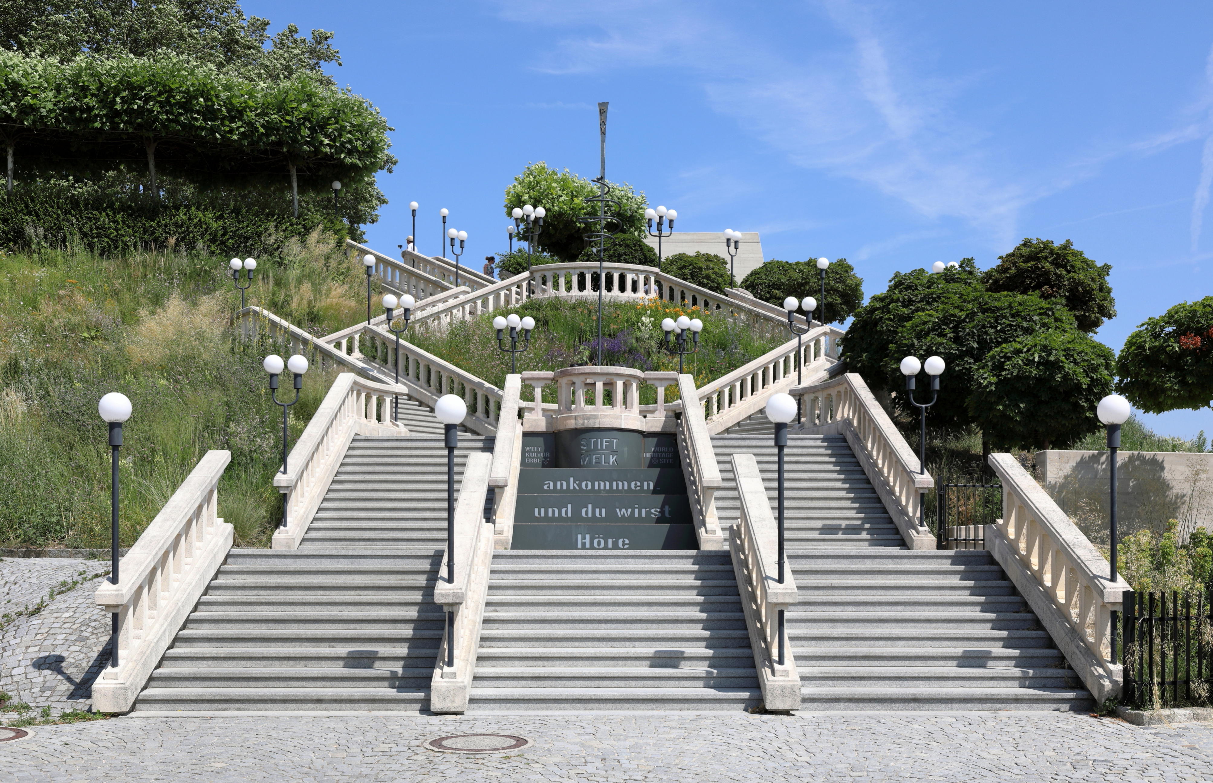 Stiegenanlage zwischen Besucherparkplatz und dem Benediktinerkloster in der niederösterreichischen Stadtgemeinde Melk.Anfang der 1990er Jahre wurde die Anlage neu gestaltet. Dabei wurden auch moderne Schmiedeeisenplastiken zum Thema Frieden nach Entwürfen von Gabriele Kutschera aufgestellt, die Stefan Haan fertigte.